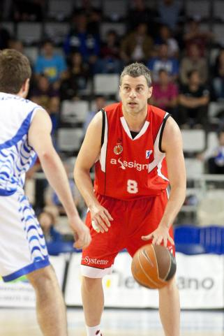 Montañez en un partido frente Lucentum Alicante